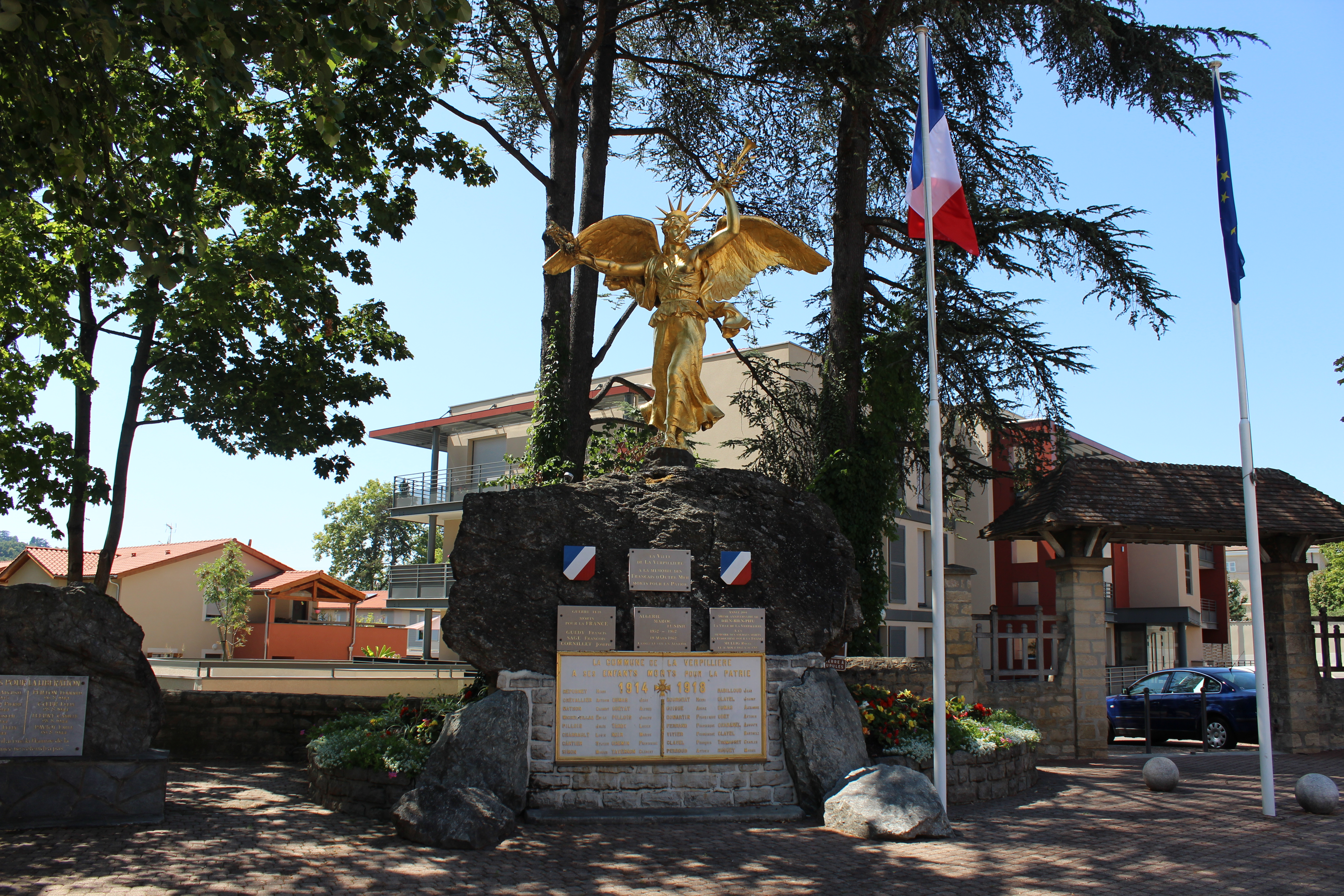 Pierre à cupules de La Verpillière, socle du monument aux morts. .